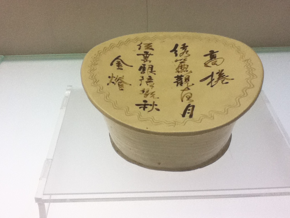 中文（香港）: 金代白瓷褐彩詩句枕，出土于太原市雙塔寺街。藏於山西省博物院